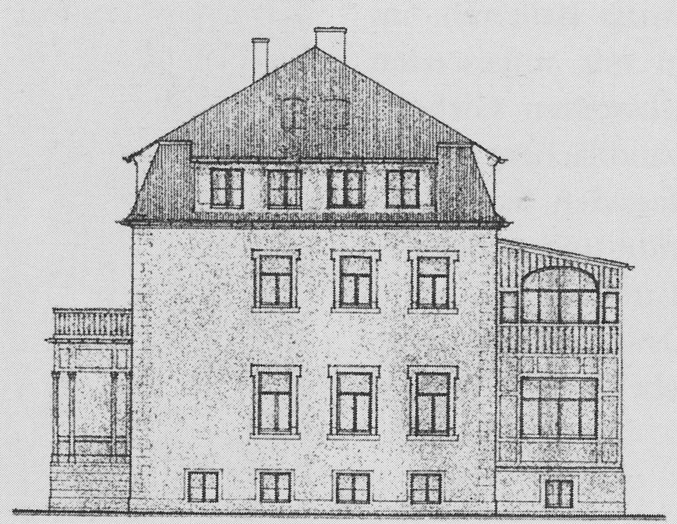 Radebeul Pestalozzistr 12 Bauzeichnung 1902